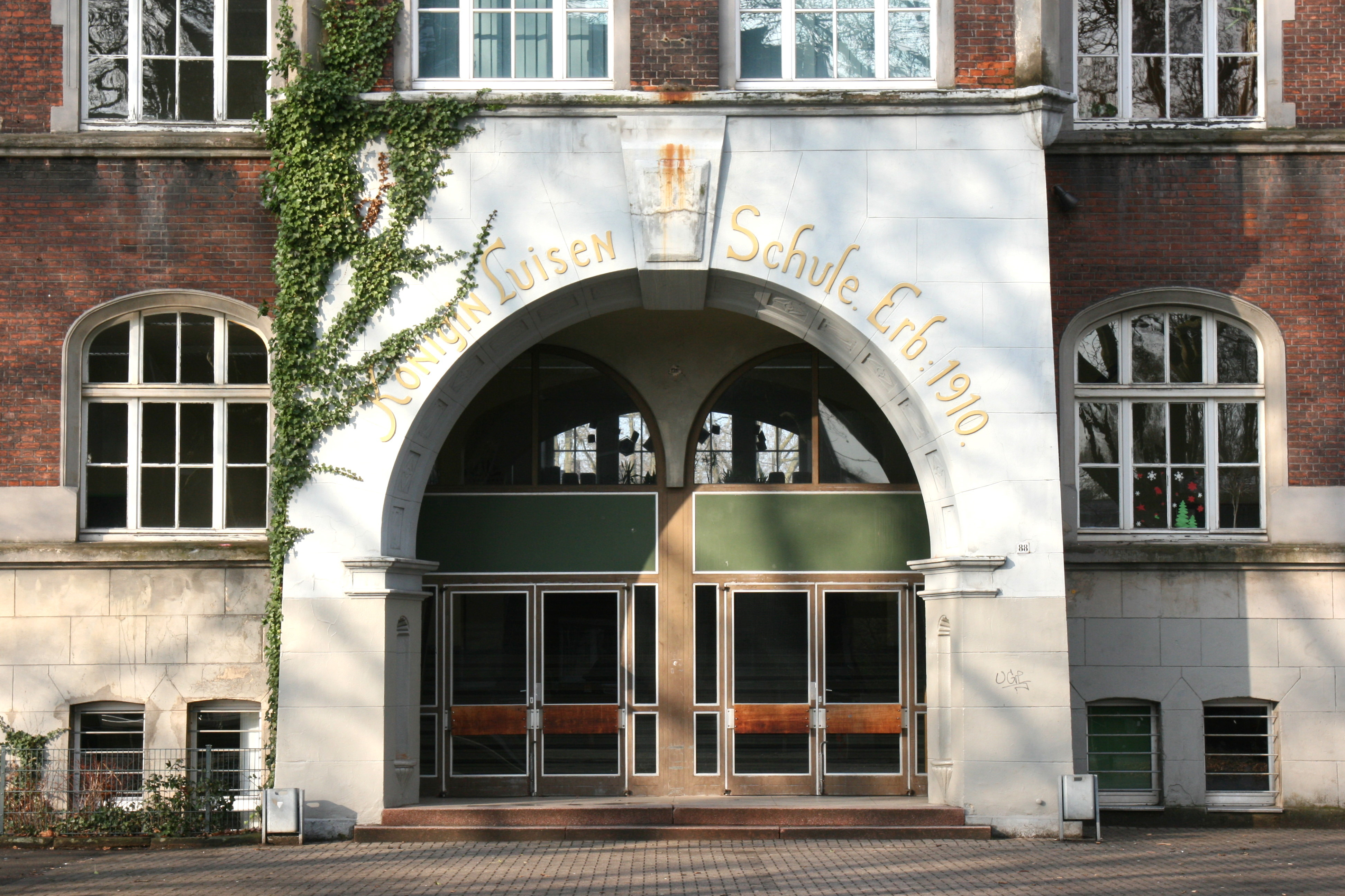 Königin-Luisen-Schule (Städt. Gemeinschaftshauptschule), Wilhelmstraße 88 in Herne